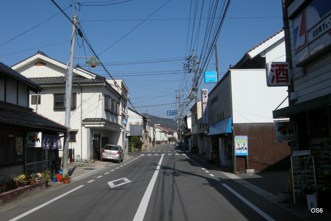 北広島町壬生の町並み